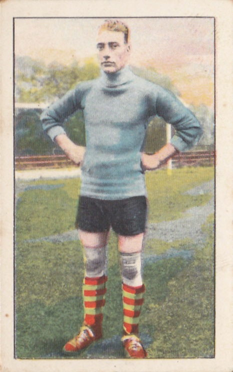 Keeper Kees Quax (ADO Den Haag, 1e klasse), 1931